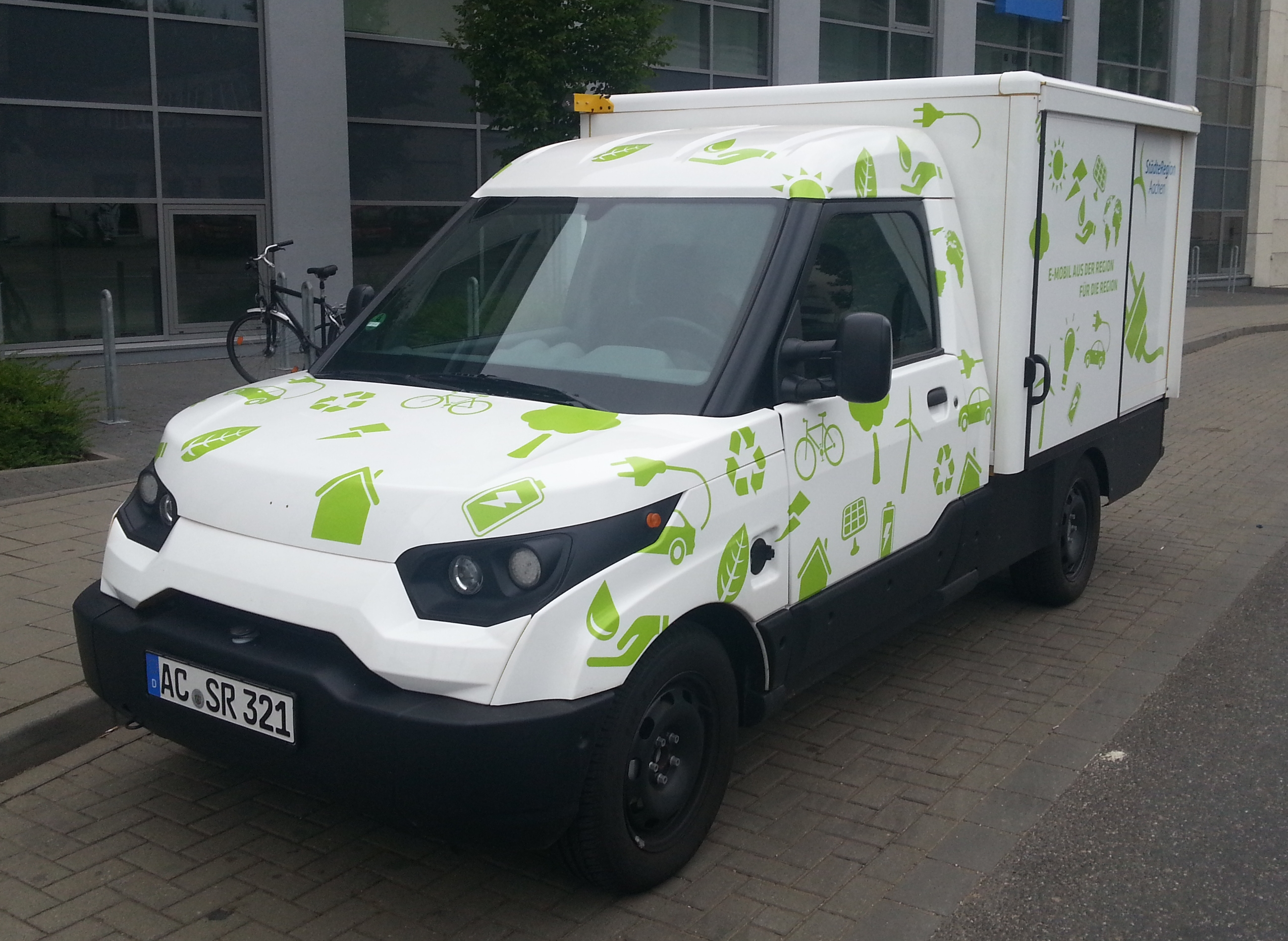 Streetscooter der Städteregion Aachen neben dem Gesundheitsamt.